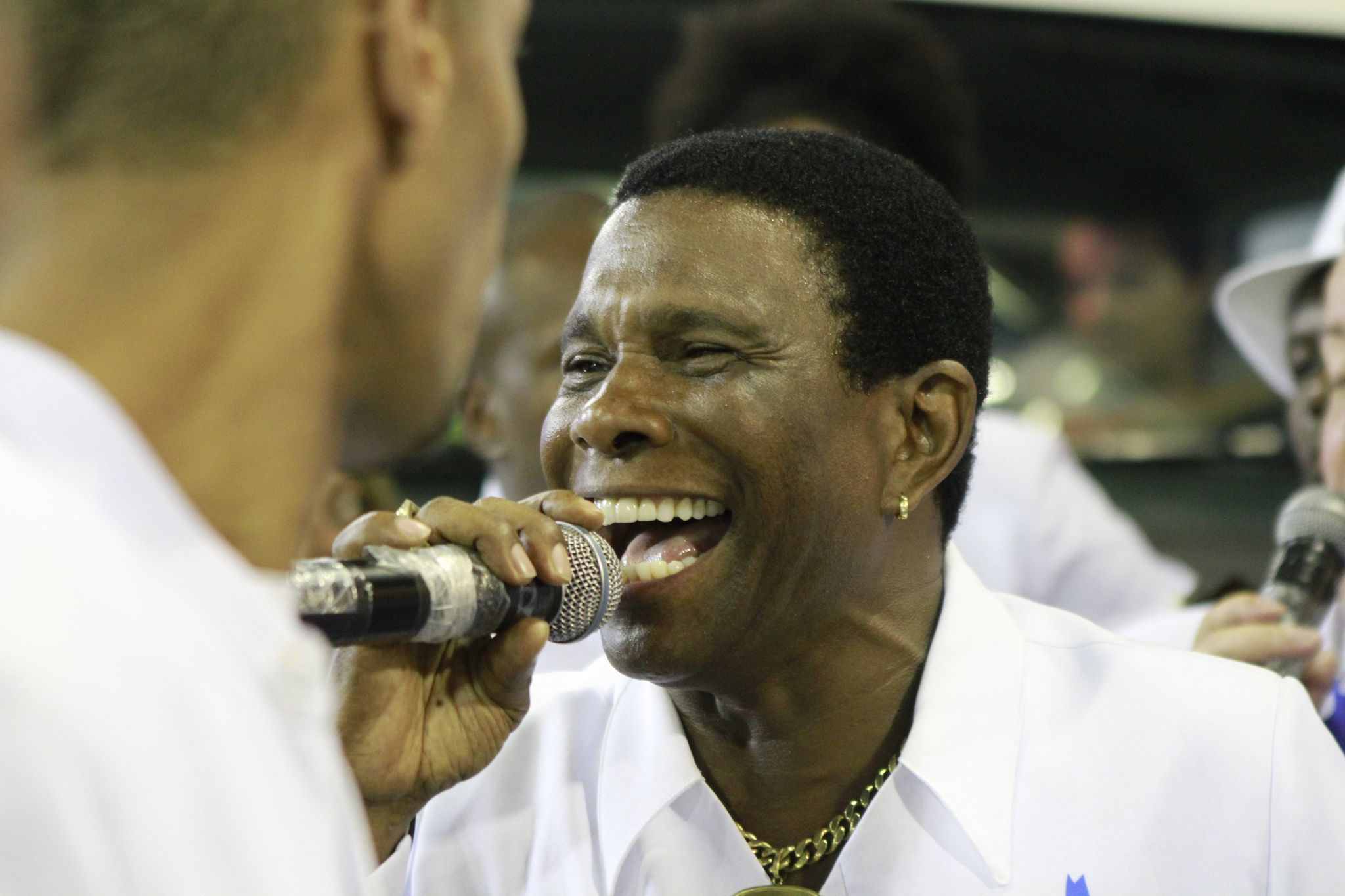 Rio de Janeiro - Segundo dia dos desfiles das escolas de samba no Rio. (Tata Barreto/Agência Brasil)